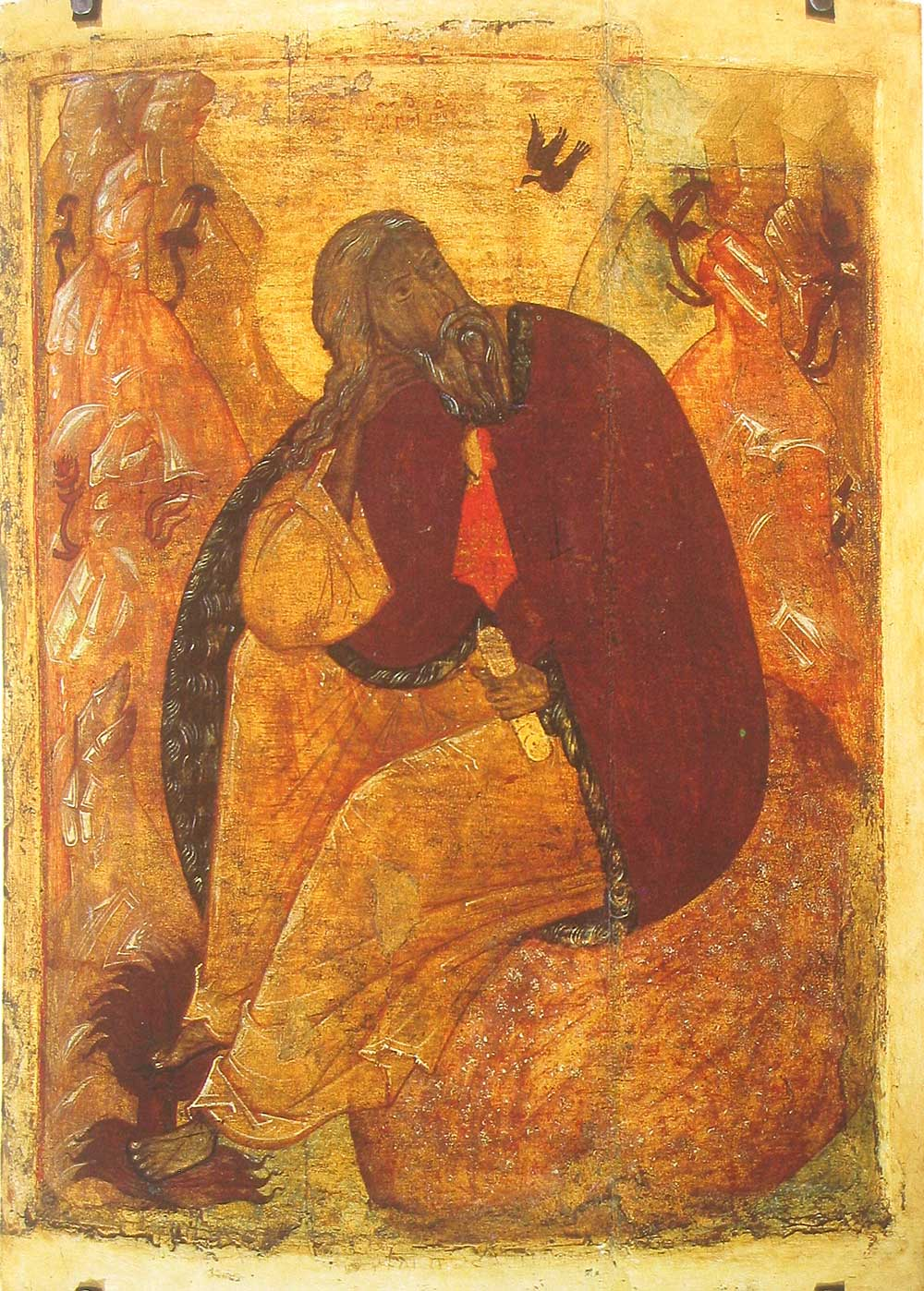 Илья Пророк в пустыне Школа или худ. центр: Ярославль Конец XV в. 97 × 73 см Ярославский художественный музей, Ярославль, Россия Инв. И-235